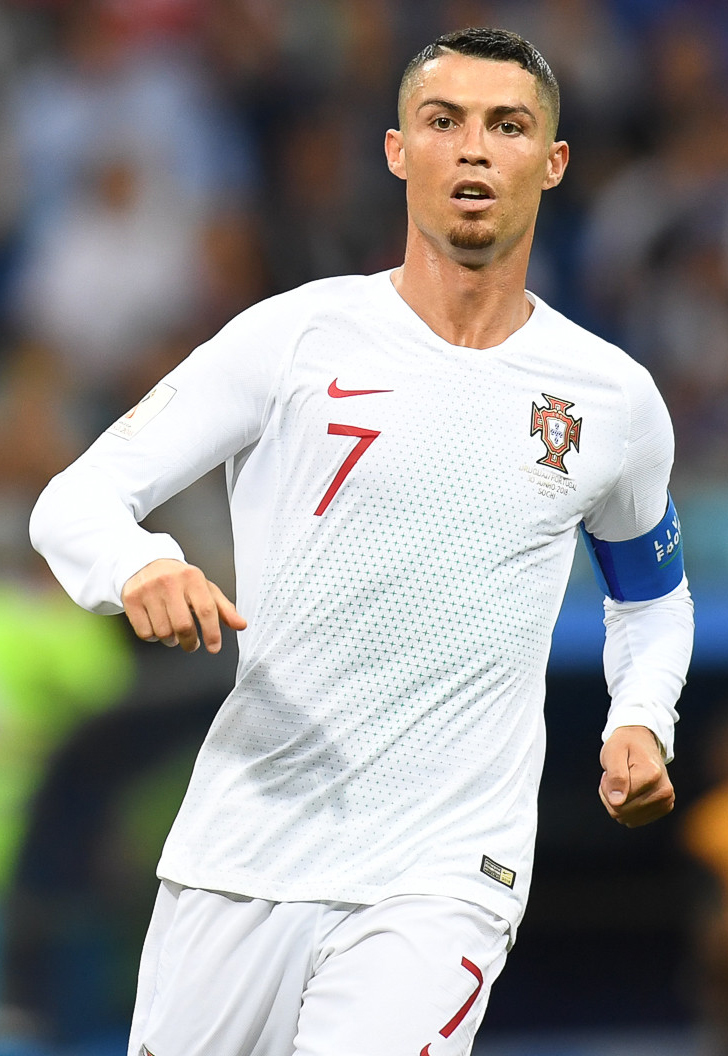 День, когда Роналду попрощался с ЧМ. Кавани и Суарес идут дальше